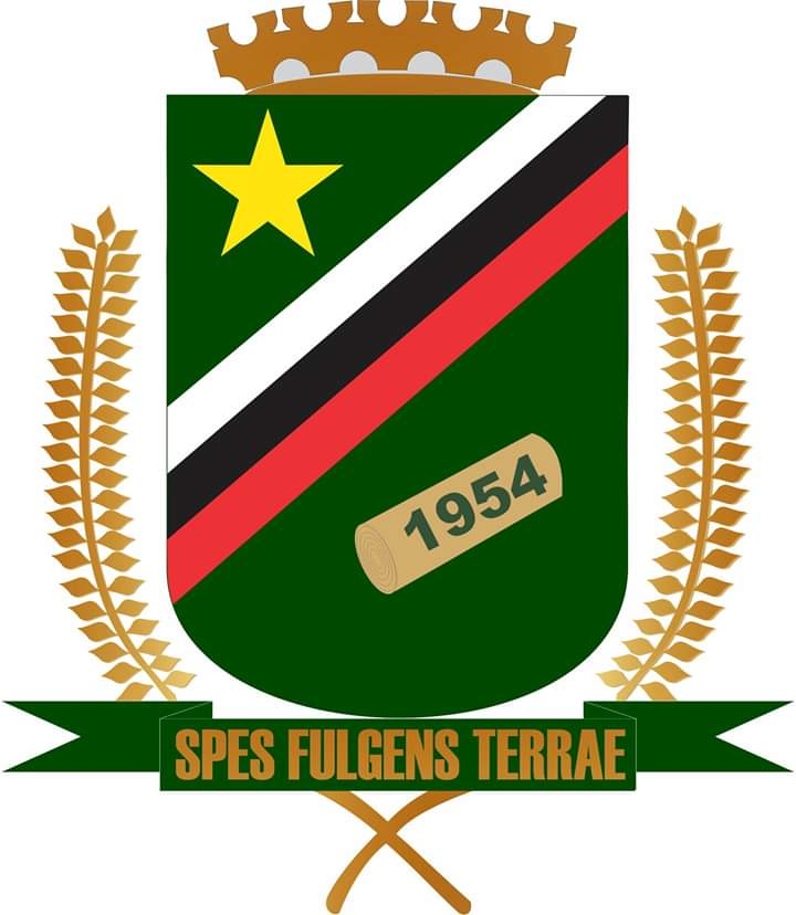 Brasão do Município de Esperantinópolis, MA